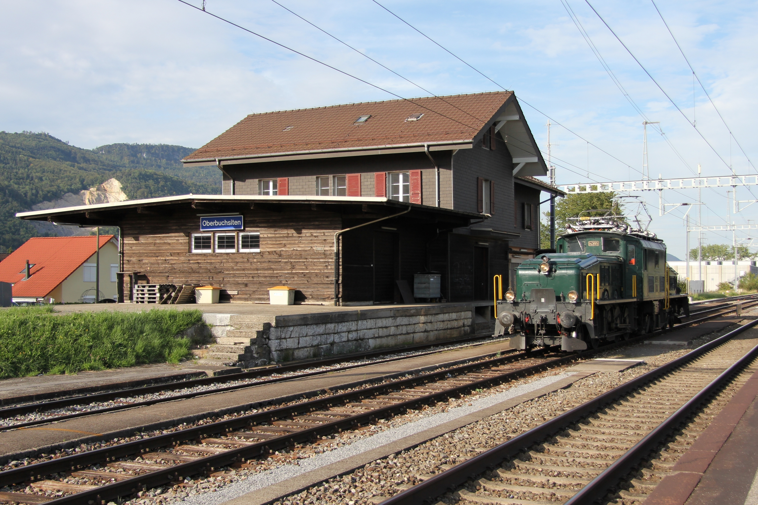 La Ce 6/8 III 14305 de CFF Historic. Train 38074 Olten - Oensingen.